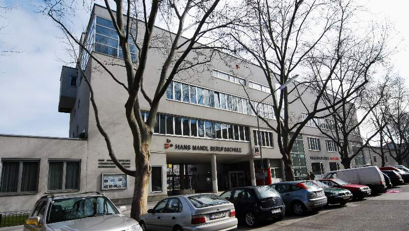 Der Haupteingang der Hans-Mandl-Berufsschule im 12. Wiener Gemeindebezirk